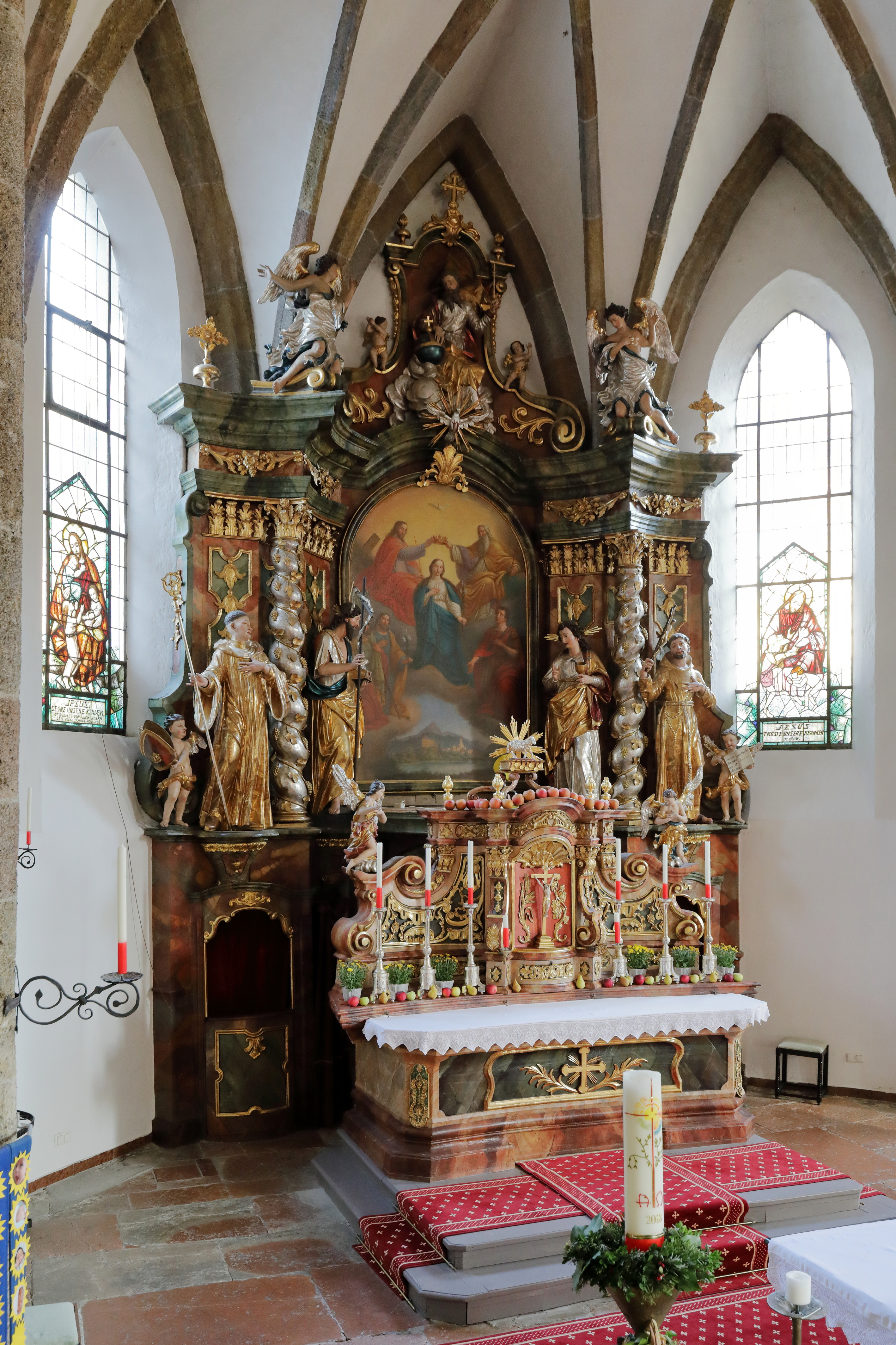 Hochaltar der röm.-kath. Pfarrkirche hl. Johannes der Täufer in der Salzburger Marktgemeinde Golling an der Salzach.Der Hochaltar mit einem Wandaufbau von 1707 hat im Sockelgeschoß seitlich eingebaute Beichtstühle. Das Hochaltarblatt Krönung Mariens mit den Wetterheiligen Johannes und Paul und Joseph malte Josef Rattensperger (1859).